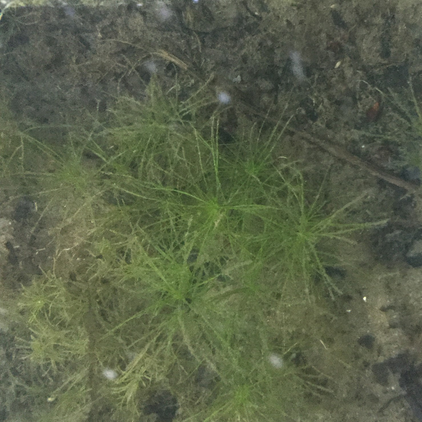 Najas minor in Ohio, USA